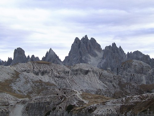 Gruppo dei Cadini